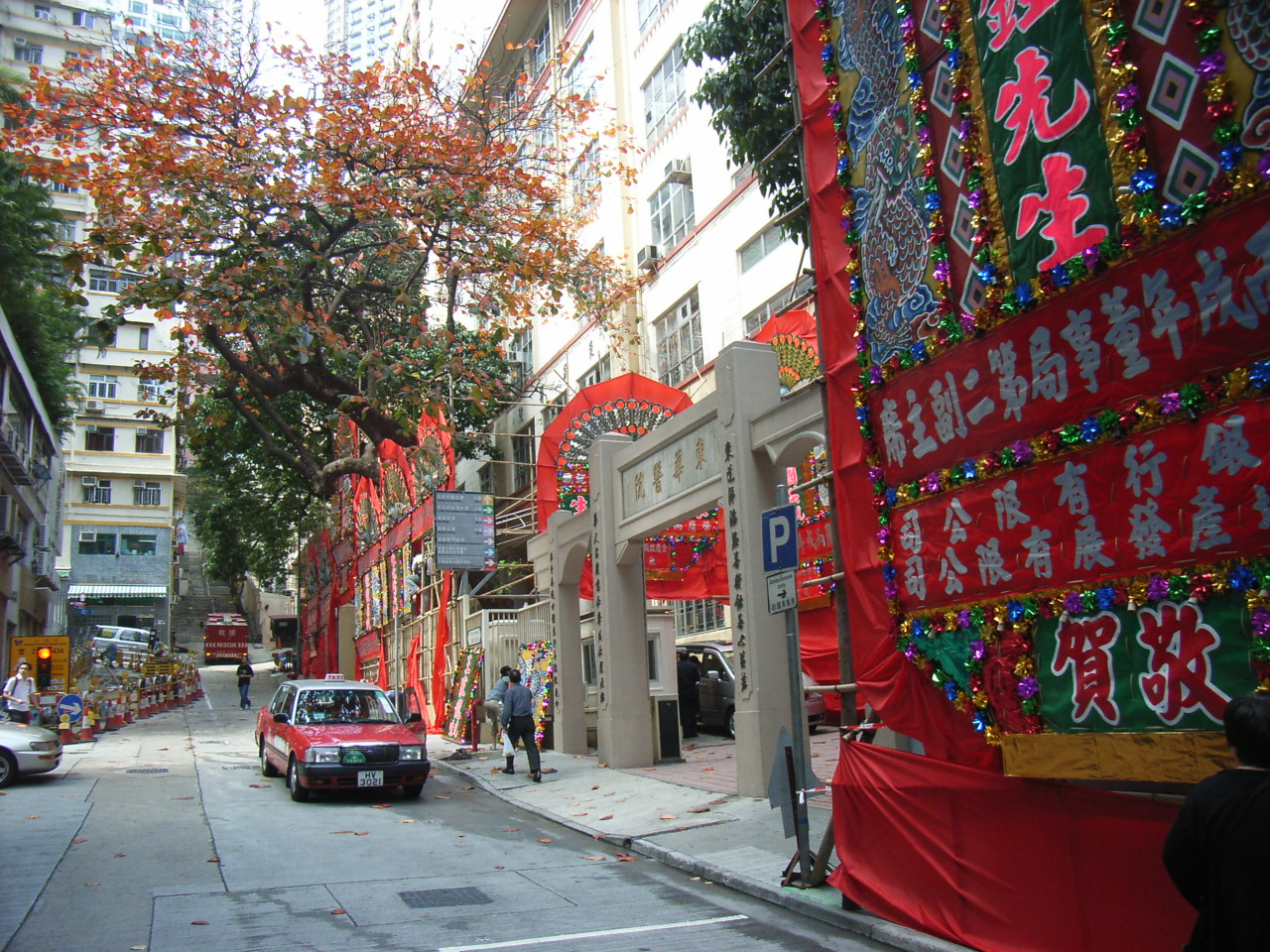 Tung Wah Hospital, Po Yan Street, Sheung Wan, HK 上環 東華醫院 正門在zh:普仁街